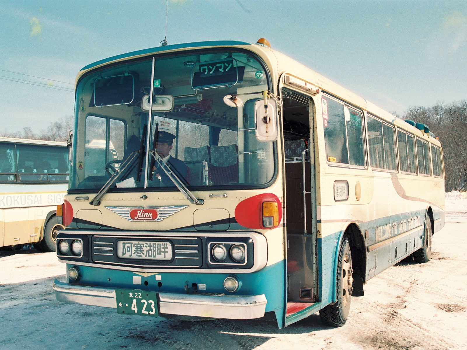 北海道釧路市に本社を置く阿寒バスの車両（阿寒湖畔（北海道釧路市、当時は阿寒町）にて）。 北海道釧路市に本社を置く阿寒バスの車両（阿寒湖畔（北海道釧路市、当時は阿寒町）にて）。